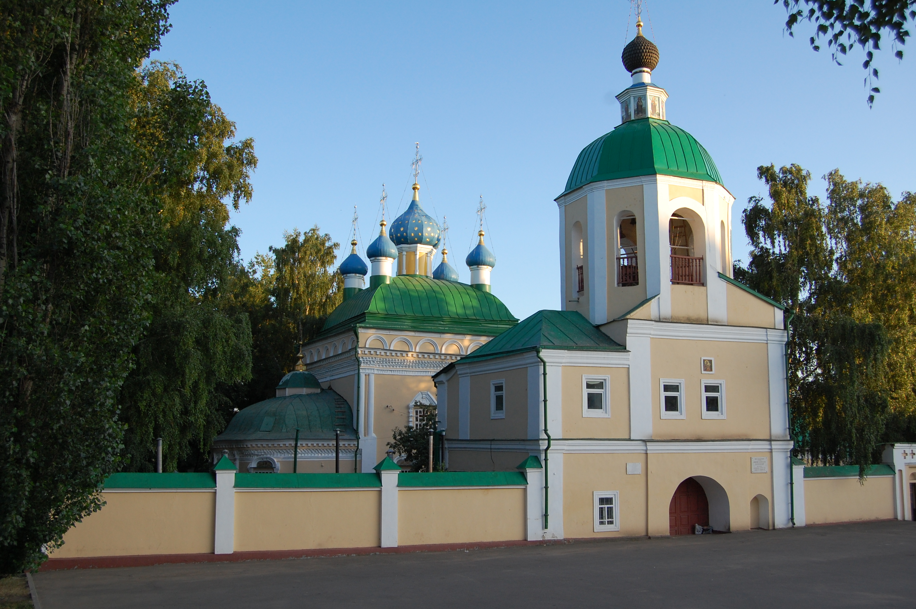 Сергиевский храм, г.Ливны, Орловская область